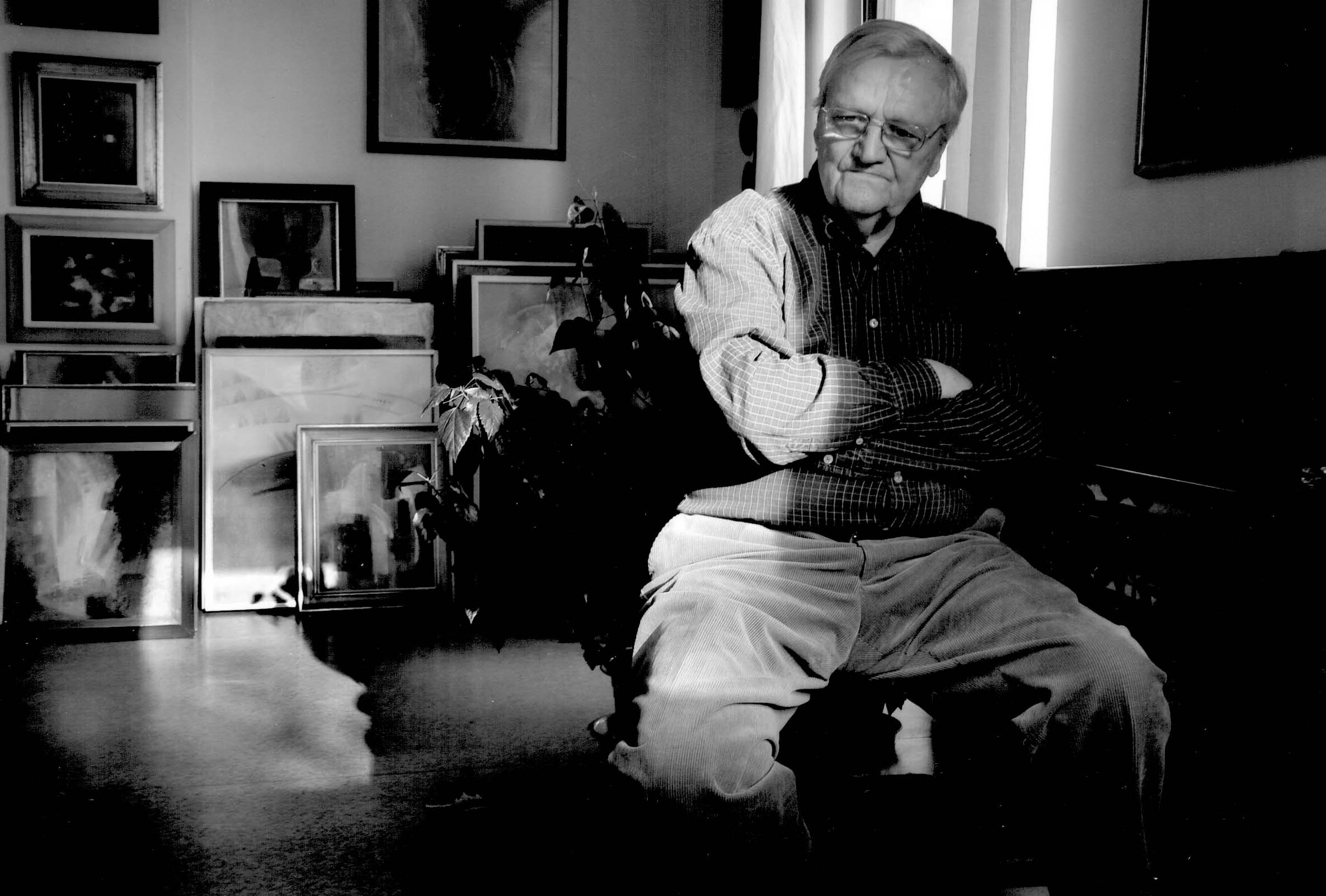 V ateliéru v Praze na Smíchově, 2012, foto Martin Říha